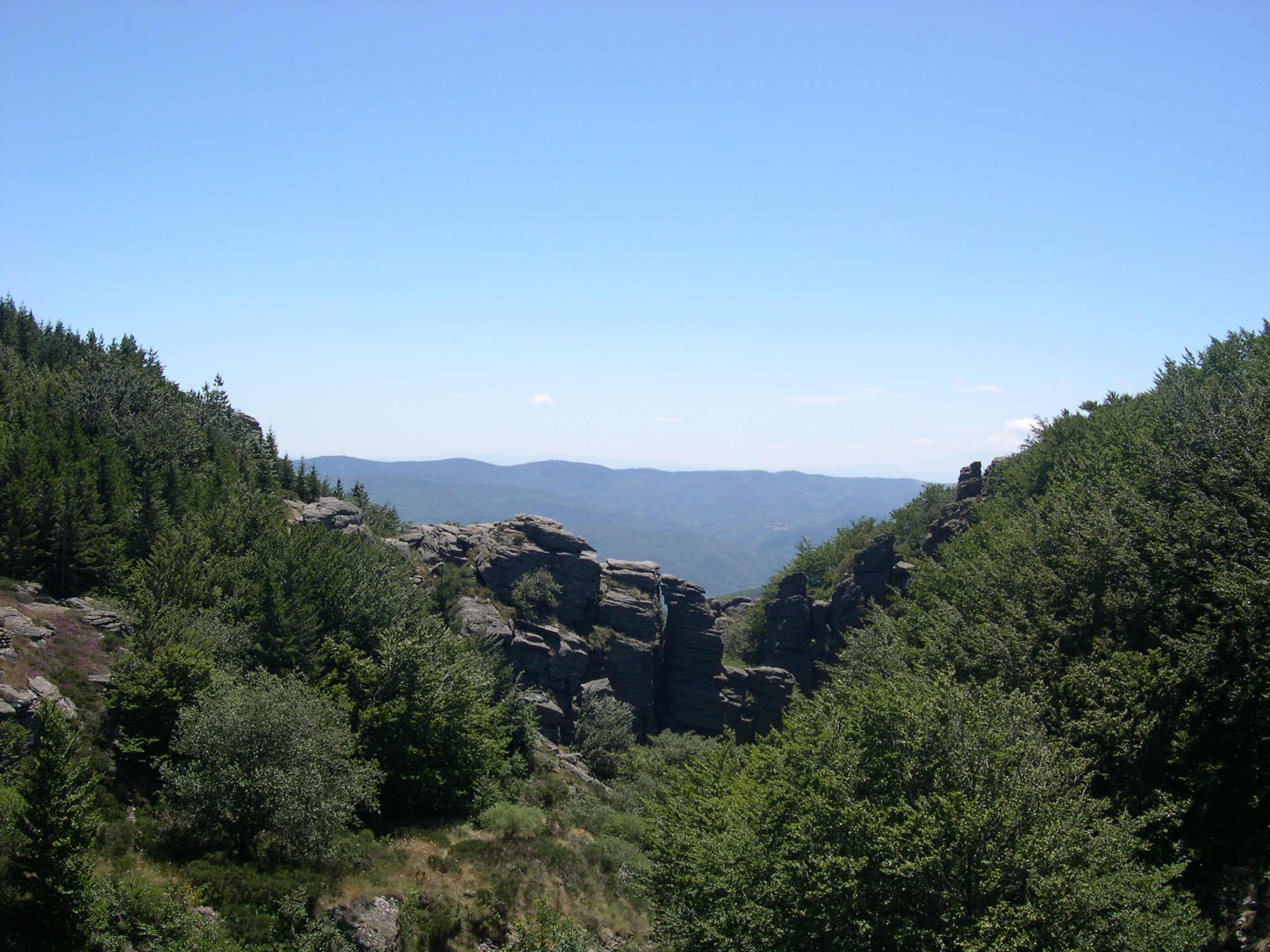 Prémian (Hérault) - au delà des rochers, commence le saut de Vézoles